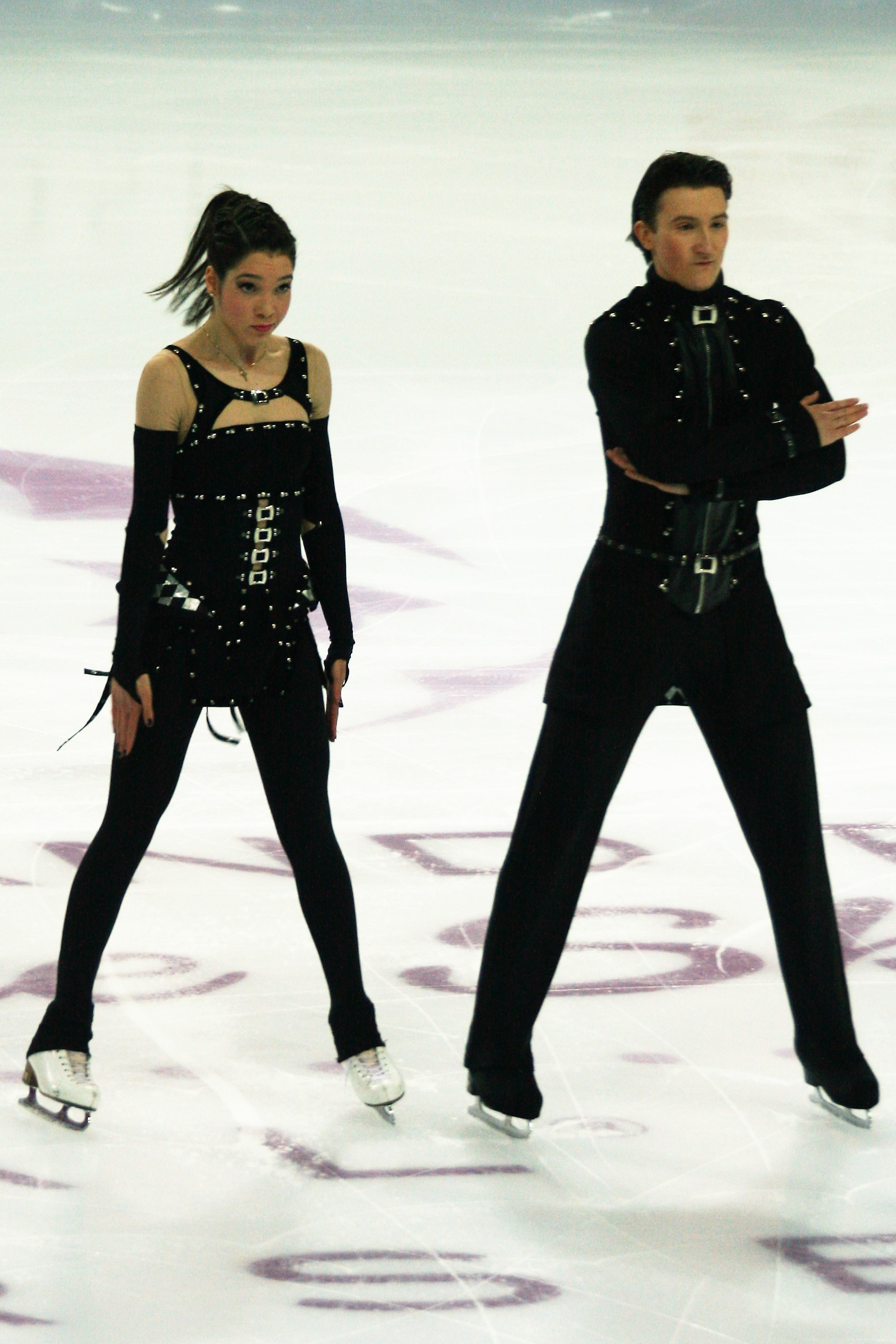 Лоррейн Макнамара / Квинн Карпентер (США) на финале Гран-при по фигурному катанию среди юниоров 2016-2017